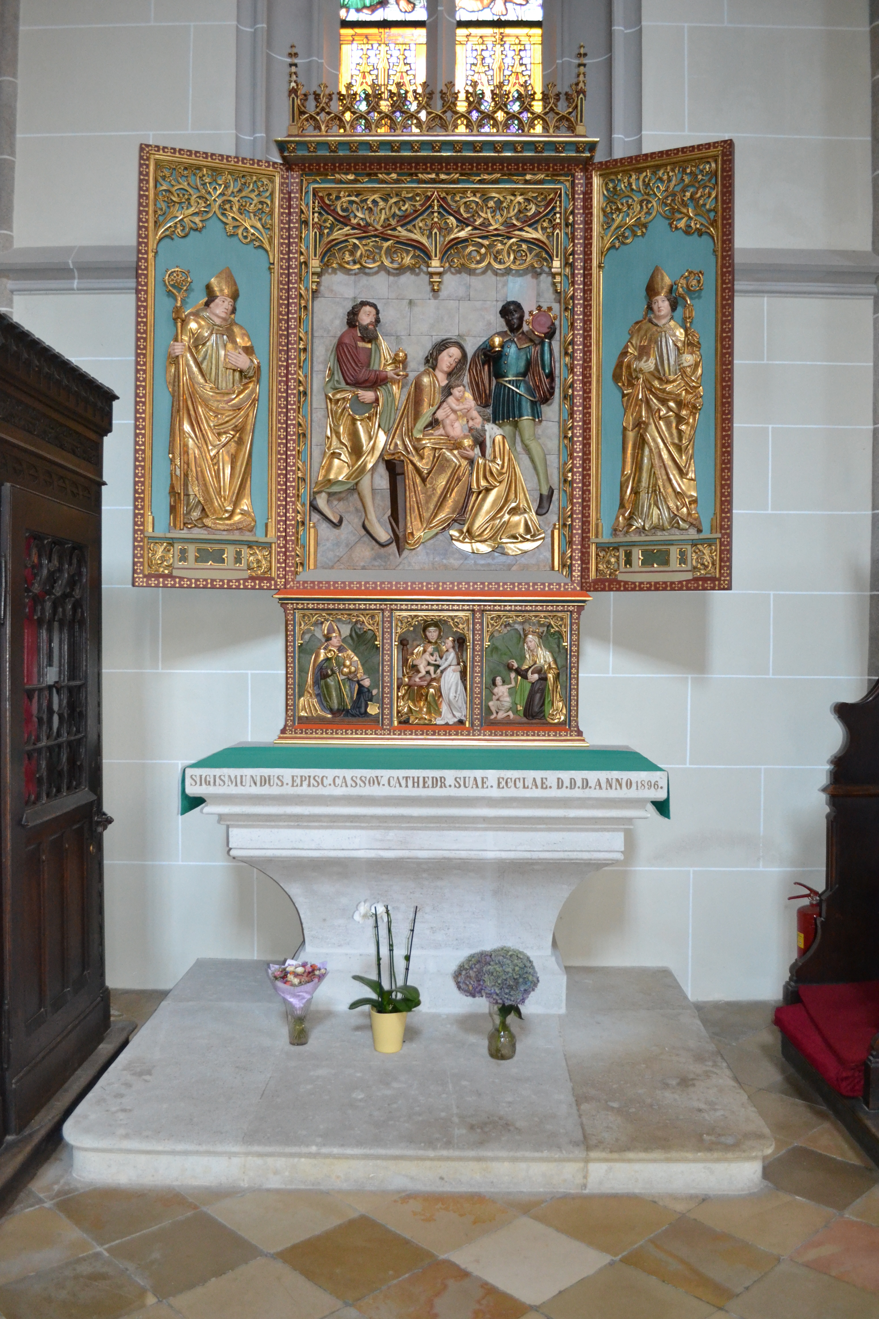 Oltár Troch kráľov v Dóme sv. Alžbety.